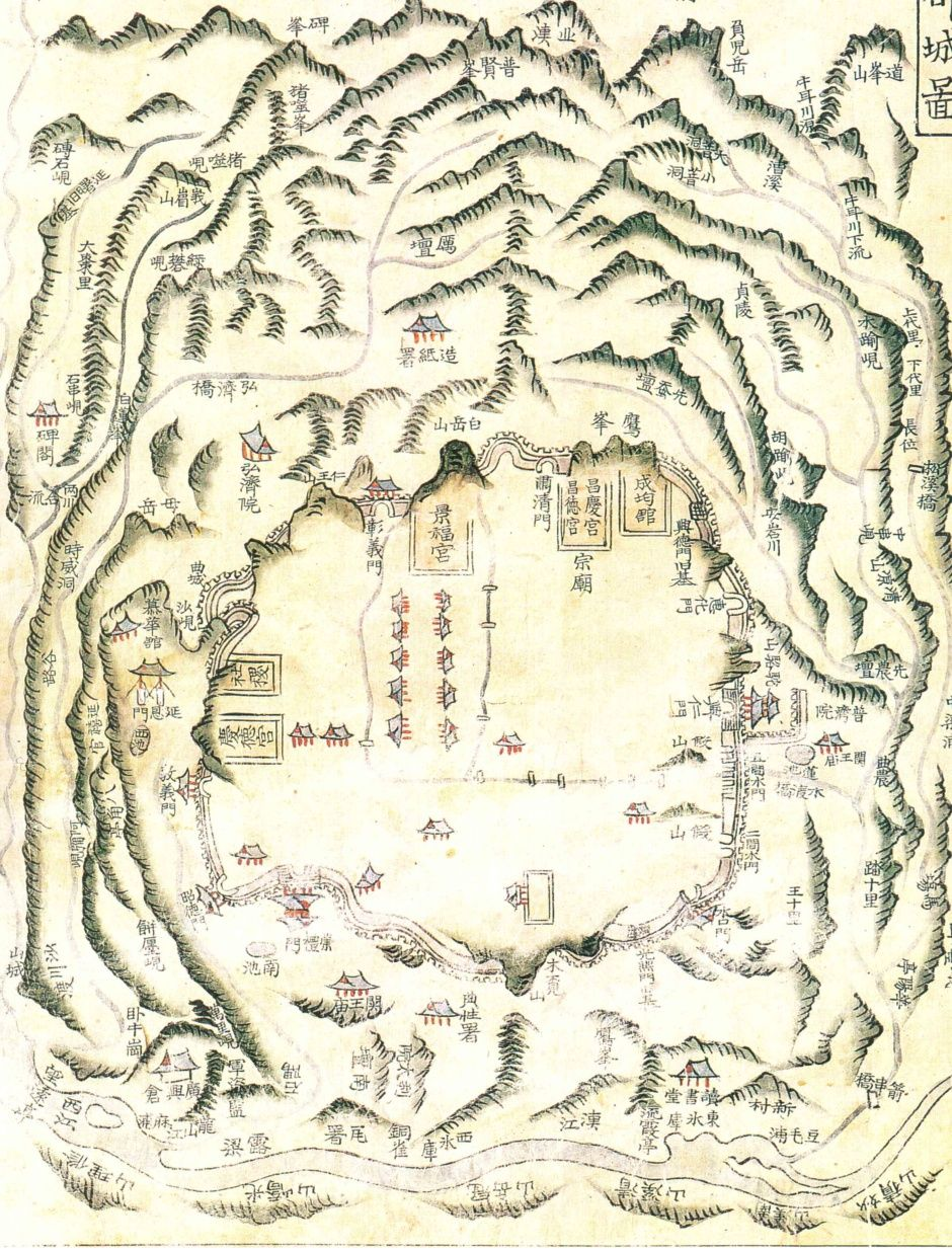 Mapa de las Tres Divisiones de Hanyang (Seúl) publicado en 1751. El emplazamiento y la distribución de Hanyang se corresponden con los principios del pungsu.